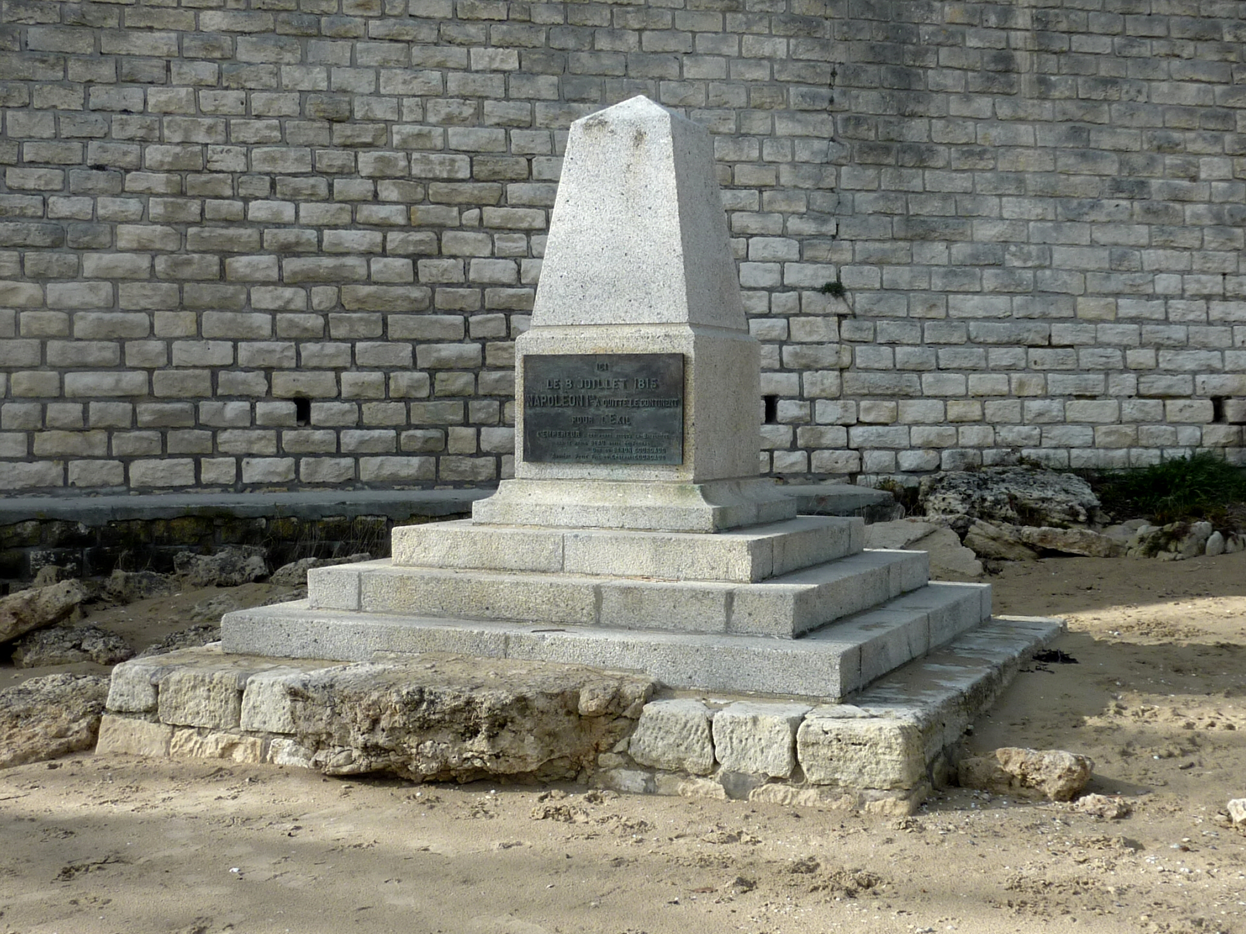 Mémorial Napoléon 1er Plage Sud Fouras Charente Maritime France